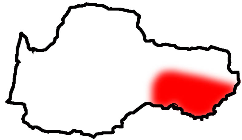 Pichòta mapa del dialecte provençal Little map of provençal dialect